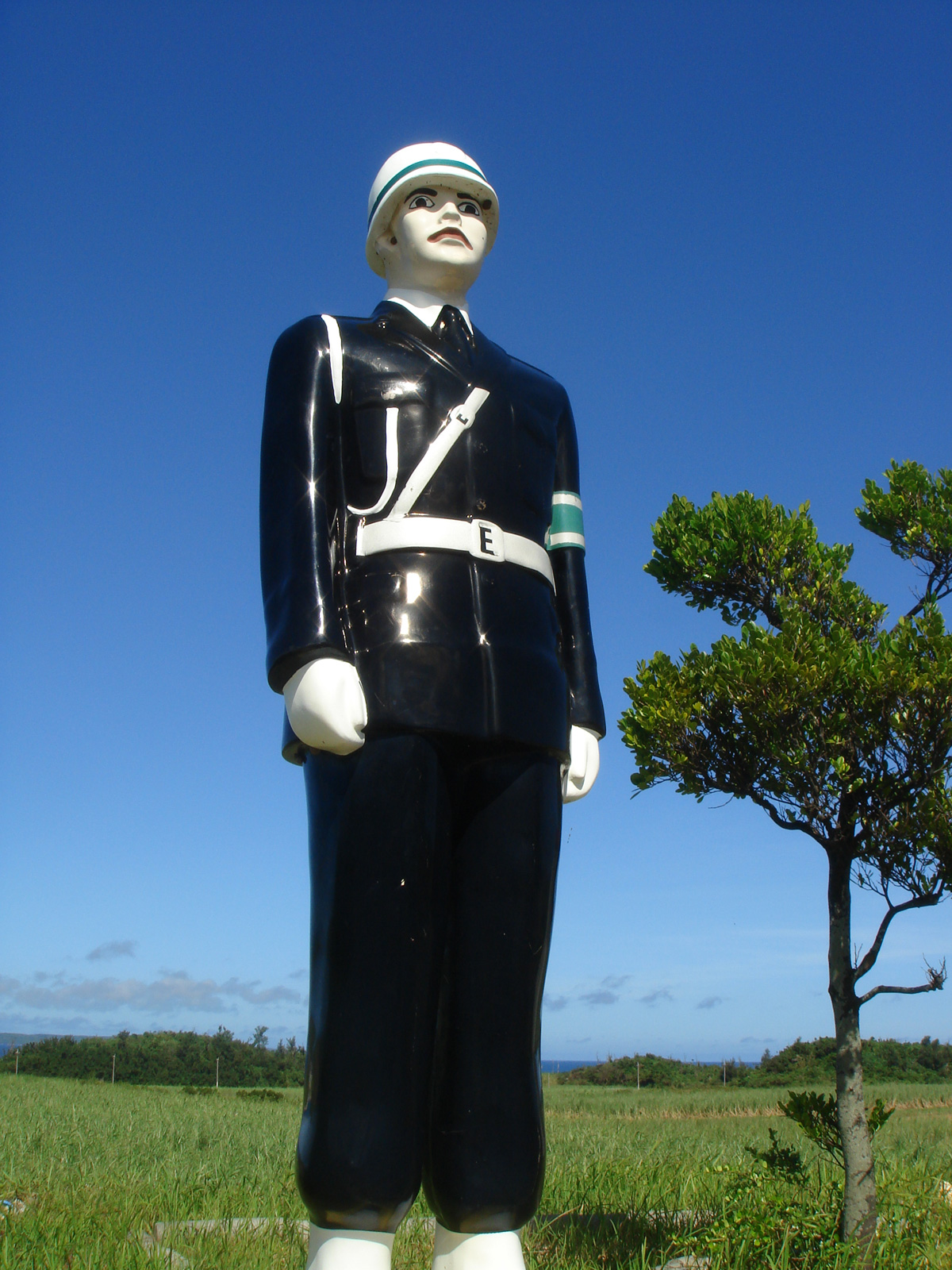 宮古まもる君（沖縄県宮古島市）